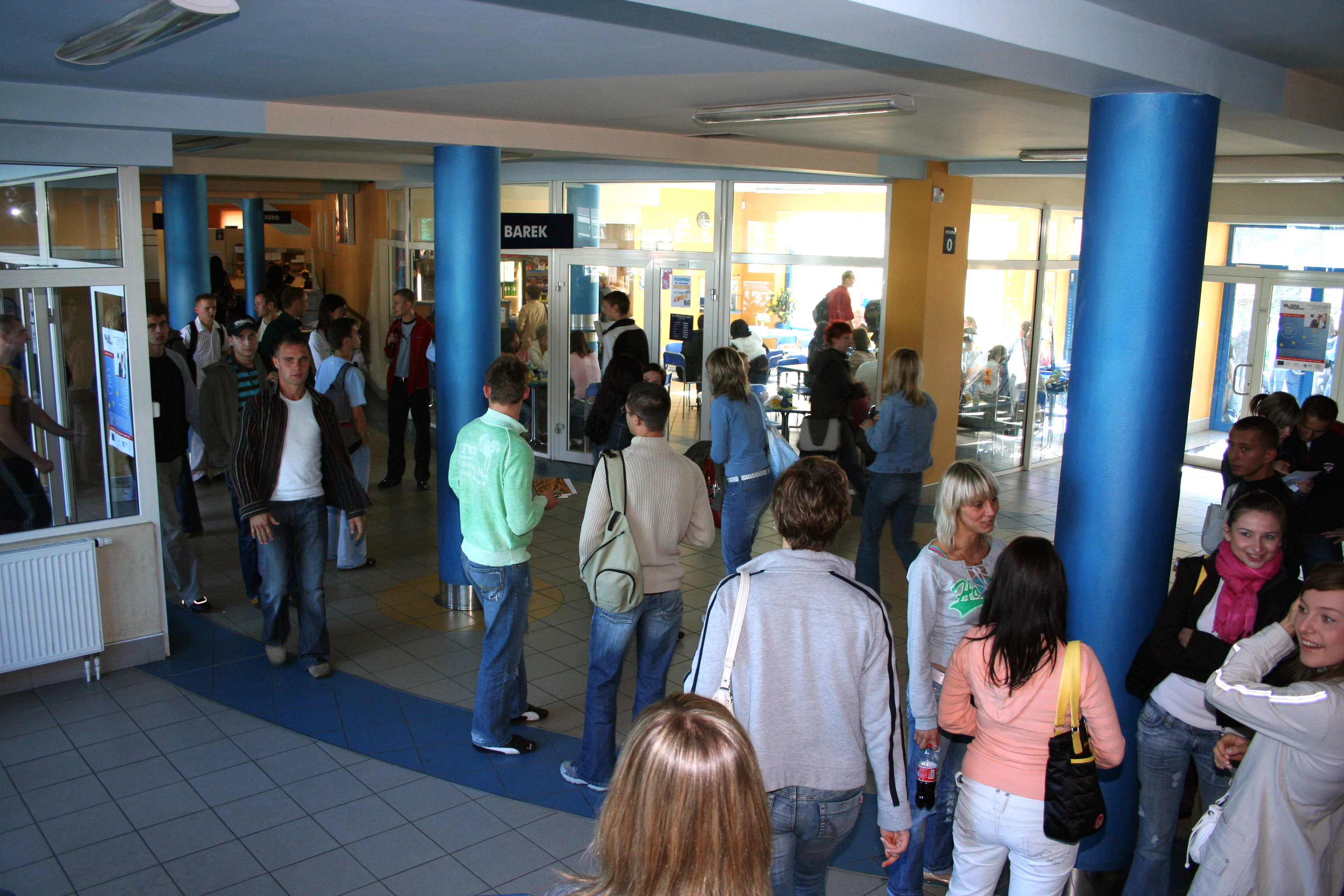 WSPA Lublin - hol główny